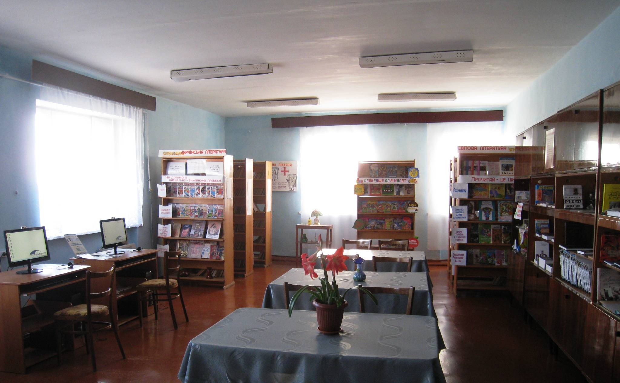 Публічний відділ публічно-шкільної бібліотеки смт Квасилів